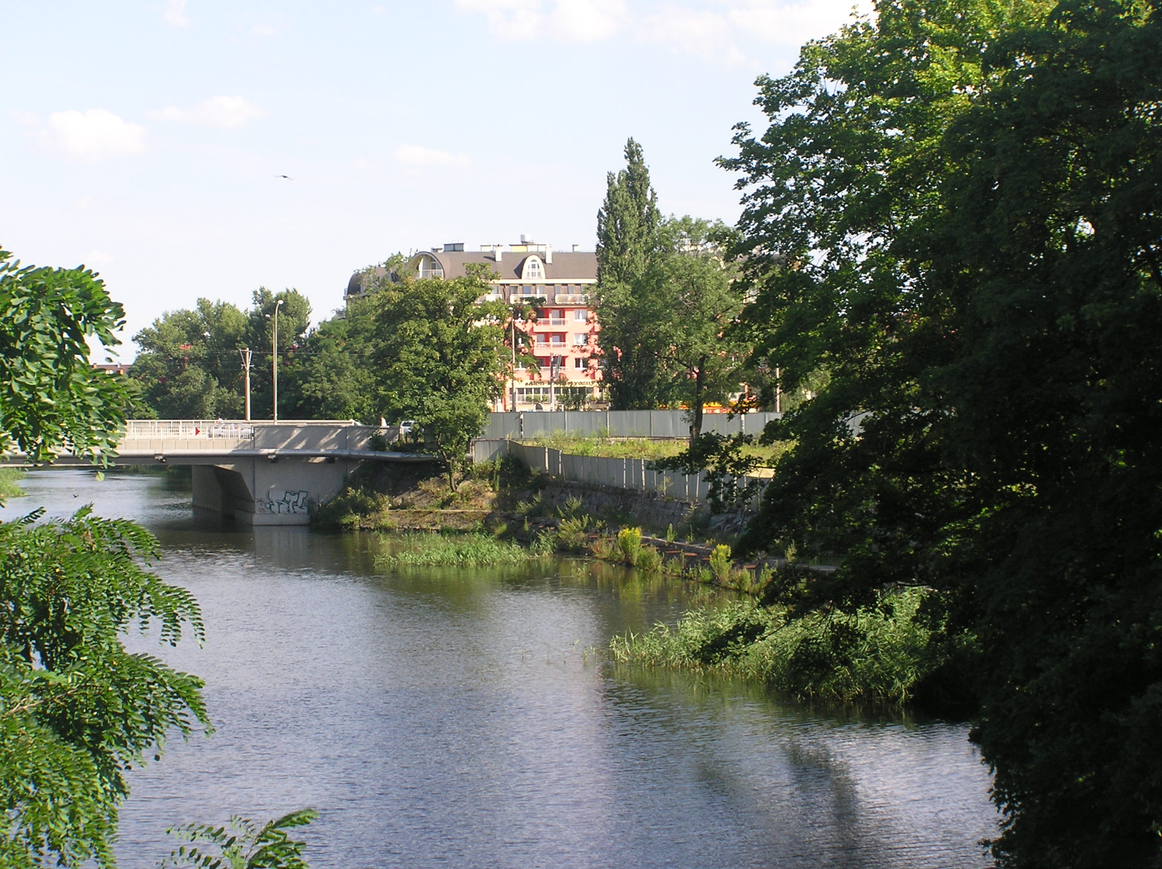 Wrocław, Kanał Miejski, Nabrzeże Browaru Piastowskiego